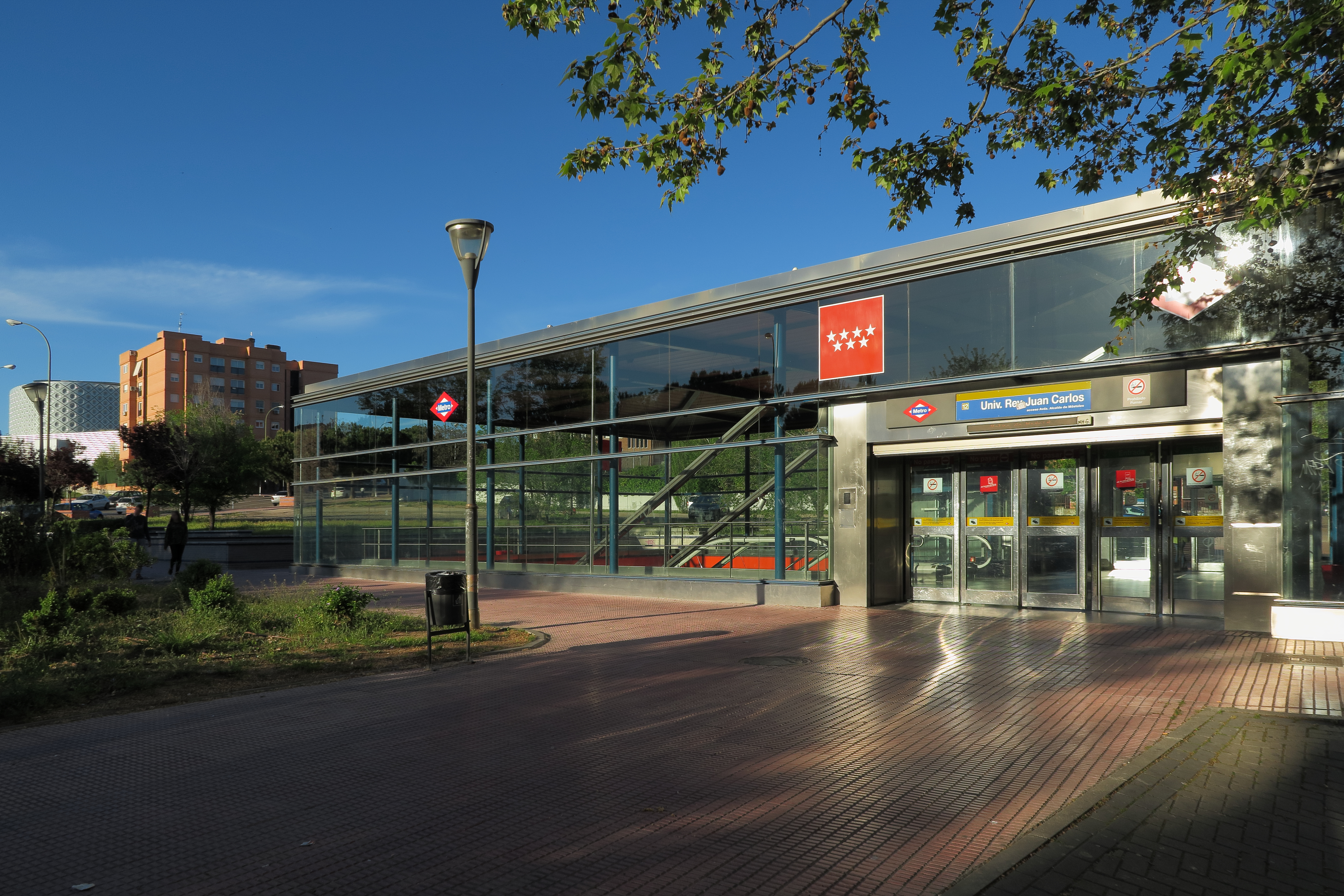 Estación de Universidad Rey Juan Carlos, acceso Avenida Alcalde de Móstoles